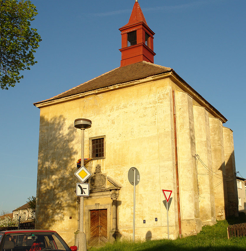 Špitál, z toho jen: kaple (Bílina)